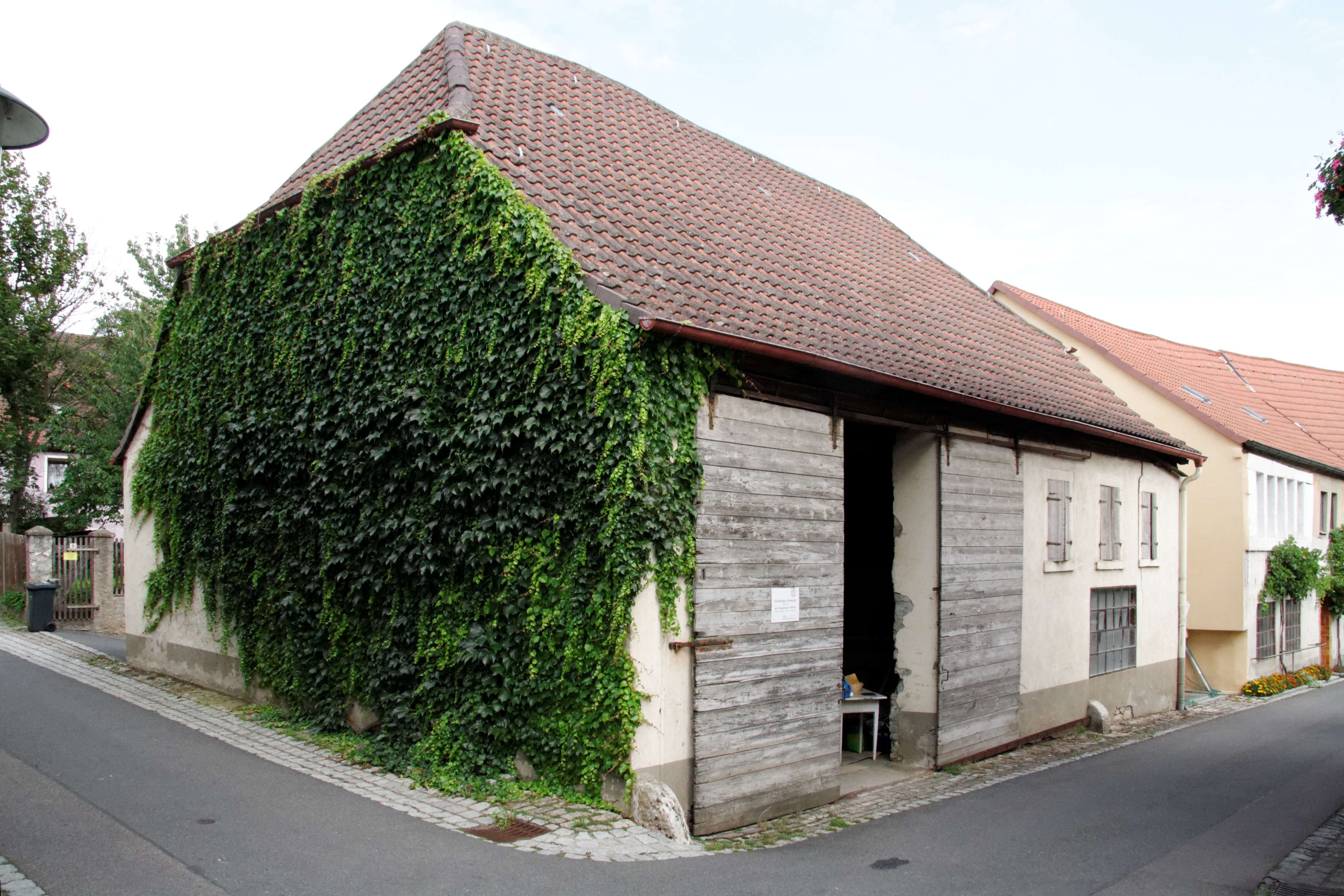 Obernbreit, ehemalige Synagoge in der Kirchgasse, Ansicht von Südwesten